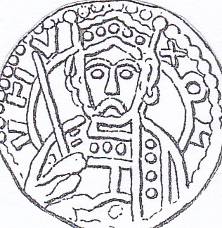 En tegning af portrætsiden af en af de mønter, som den skånske konge Oluf Haraldsen (konge 1139-1143), nogle gange kaldet Oluf 2., lod præge i Lund mellem 1140 og 1143. Tegningen gjort af numismatiker og administrerende inspektør for Den Kongelige Mønt- og Medaillesamling P. Hauberg (1844-1928).